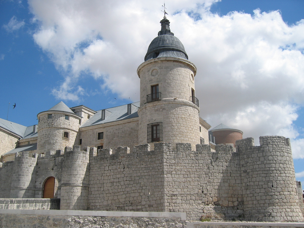 Vista lateral del castillo de Simancas, Valladolid, sede del Archivo General de Simancas.